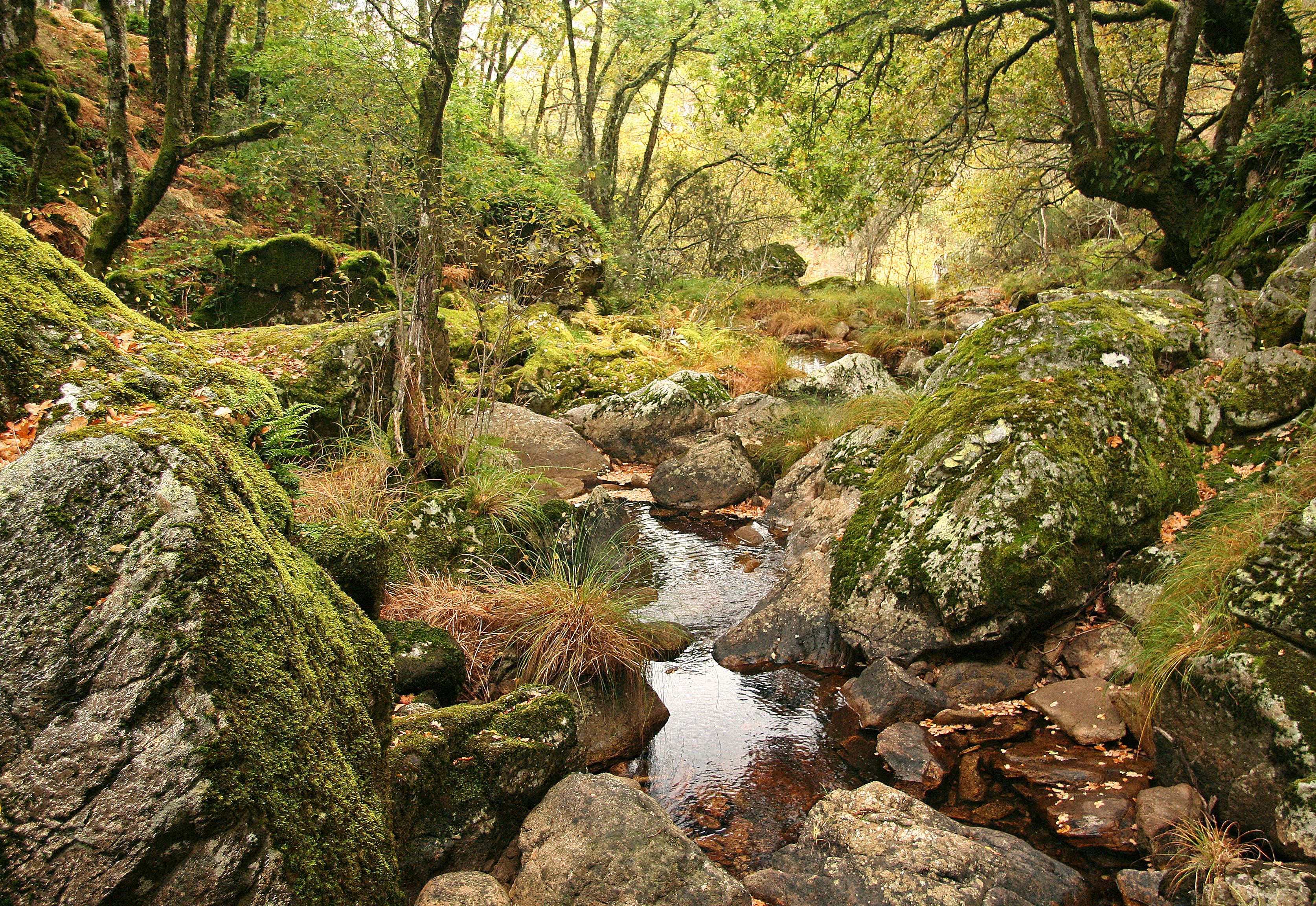 Gerês